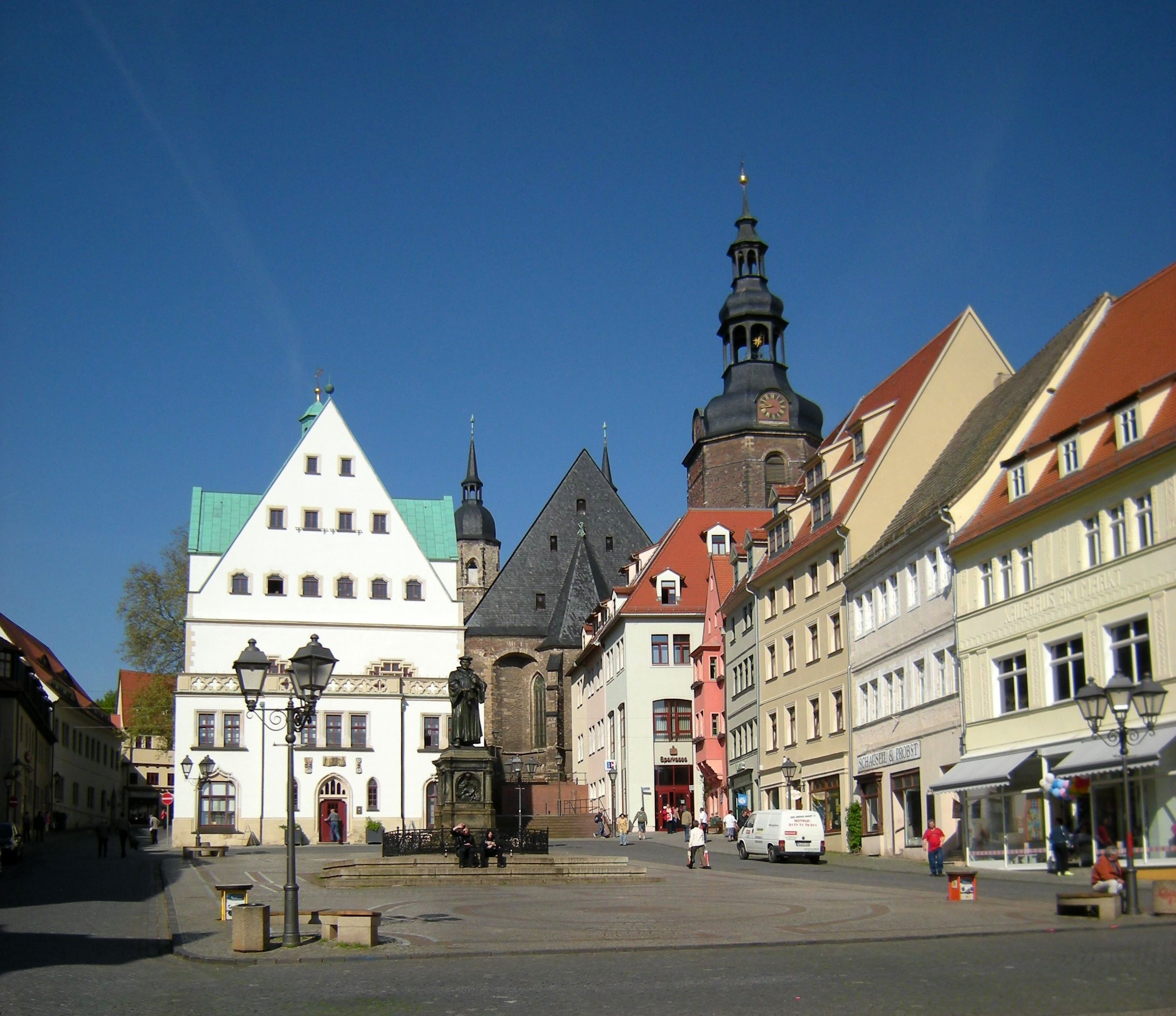 Eisleben - Marktplatz mit Rathaus und Turm der Andreaskirche